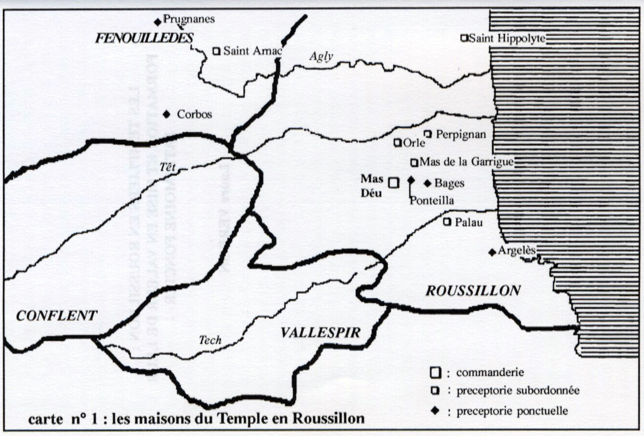 Mapa de les possessions del Temple a la Catalunya Nord, segons Laure Verdon (a VV. AA. 1998)